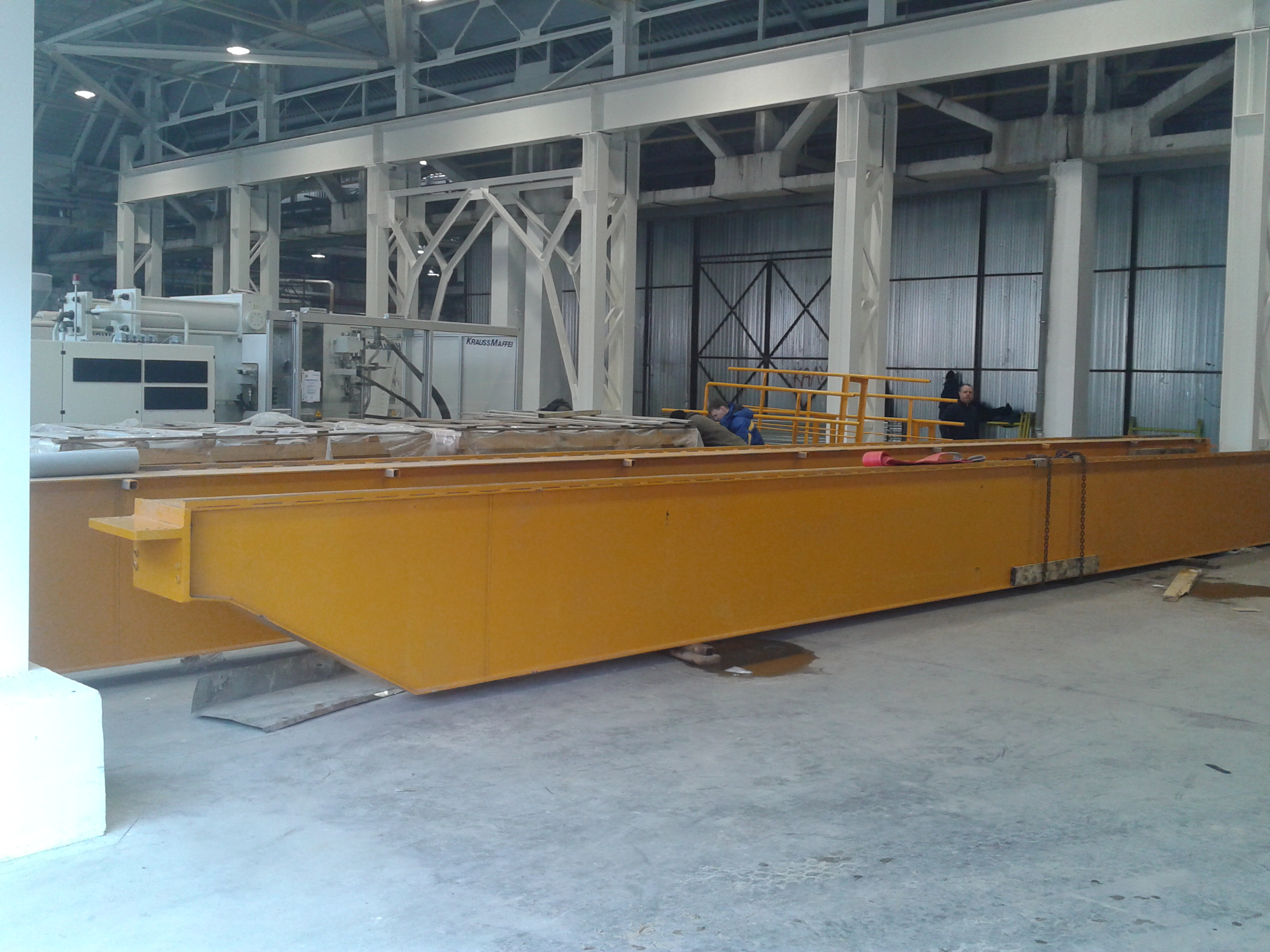 most 1 del dvonosilčnega dvigala, vir dvonosilčno mostno dvigalo 30t+30t Russia/Kaluga